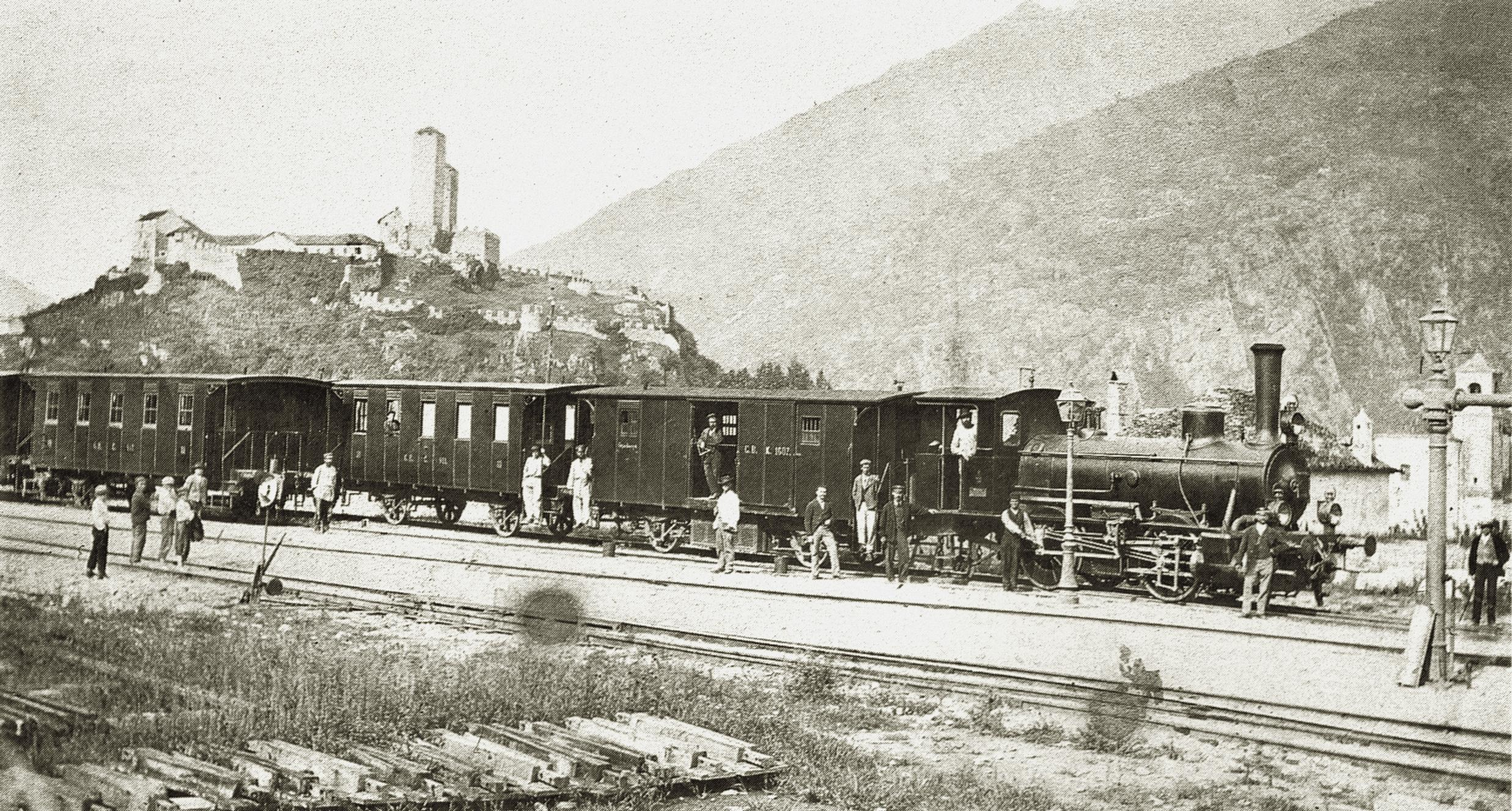 Die Gotthardbahn-Gesellschaft konnte die „Tessinischen Talbahnen“ (Chiasso-Lugano und Biasca-Bellinzona-Locarno) im Jahr 1874 eröffnen. Das Bild zeigt einen charakteristischen Zug mit Lokomotive E 2/2 Nr. 4, gebaut 1874 in der Schweizerischen Lokomotiv- und Maschinenfabrik in Winterthur, und Zweiachswagen im provisorischen Bahnhof Bellinzona